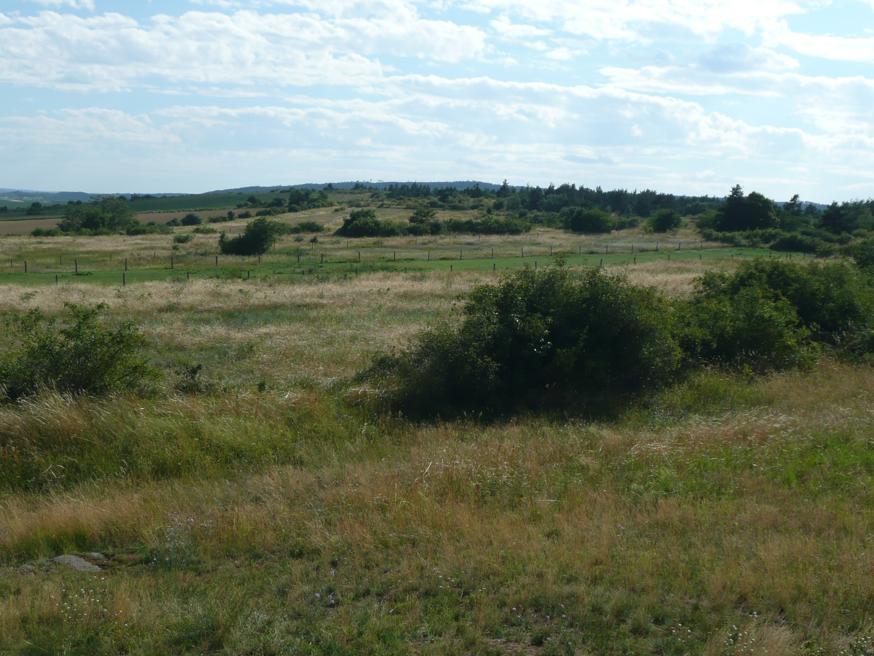 Havranické vřesoviště, východní okraj NP Podyjí.